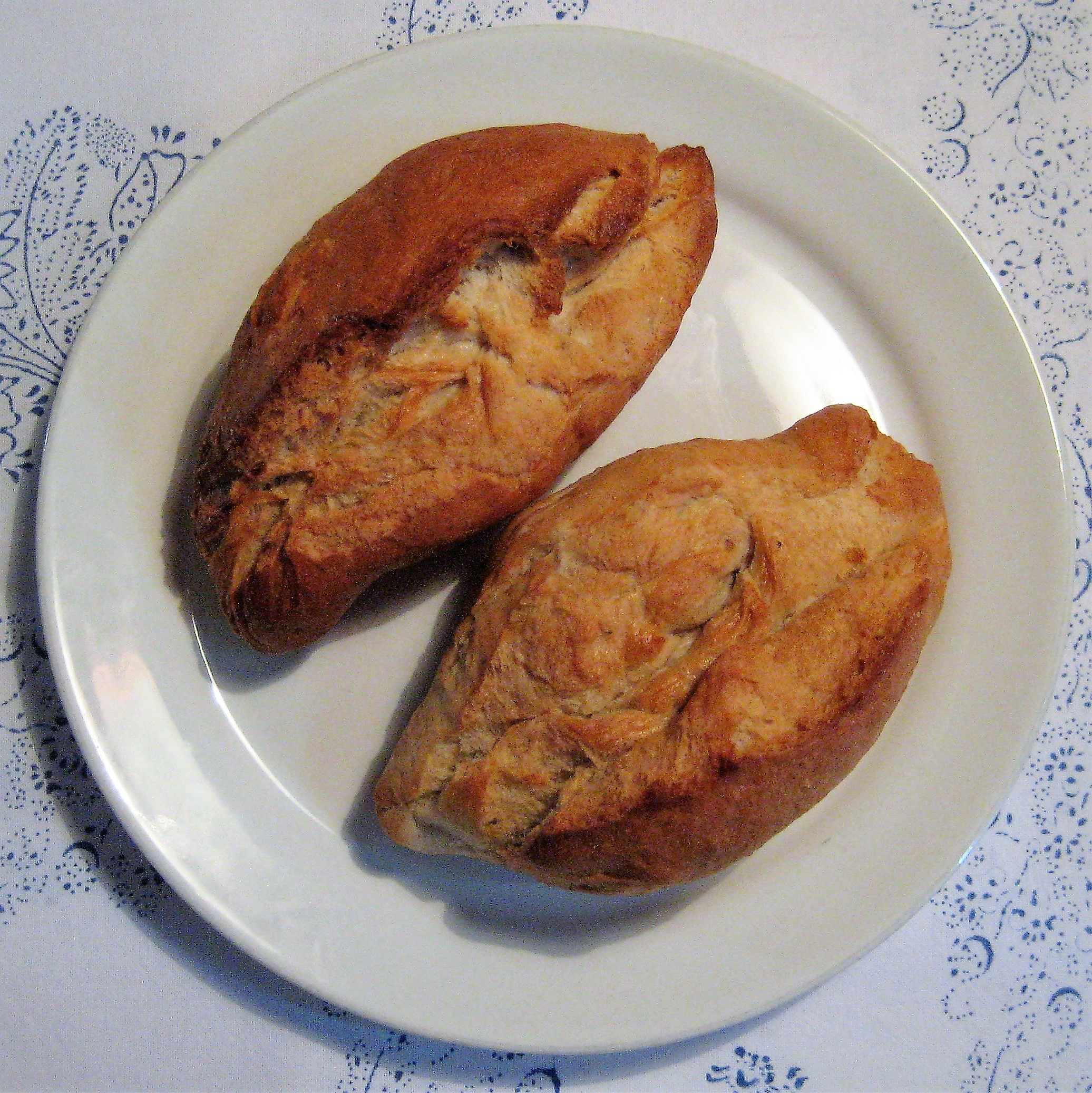 2 Stck. Schwarzer-Kipferl des Traditionsbackhauses Schwarzer in Regensburg in Bayern, Deutschland.